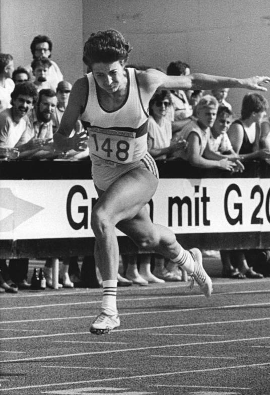 Silke Gladisch ADN-ZB Koard 21.8.87 Potsdam: 38. DDR-Leichtathletik-Meisterschaften - Den Titel über 200 m erkämpfte sich die 23jährige Studentin für Sport und Geschichte Silke Gladisch (SC Empor Rostock) mit der Weltjahresbestzeit von 21,79 s und eroberte sich damit den vierten Platz in der ewigen Weltbestenliste.